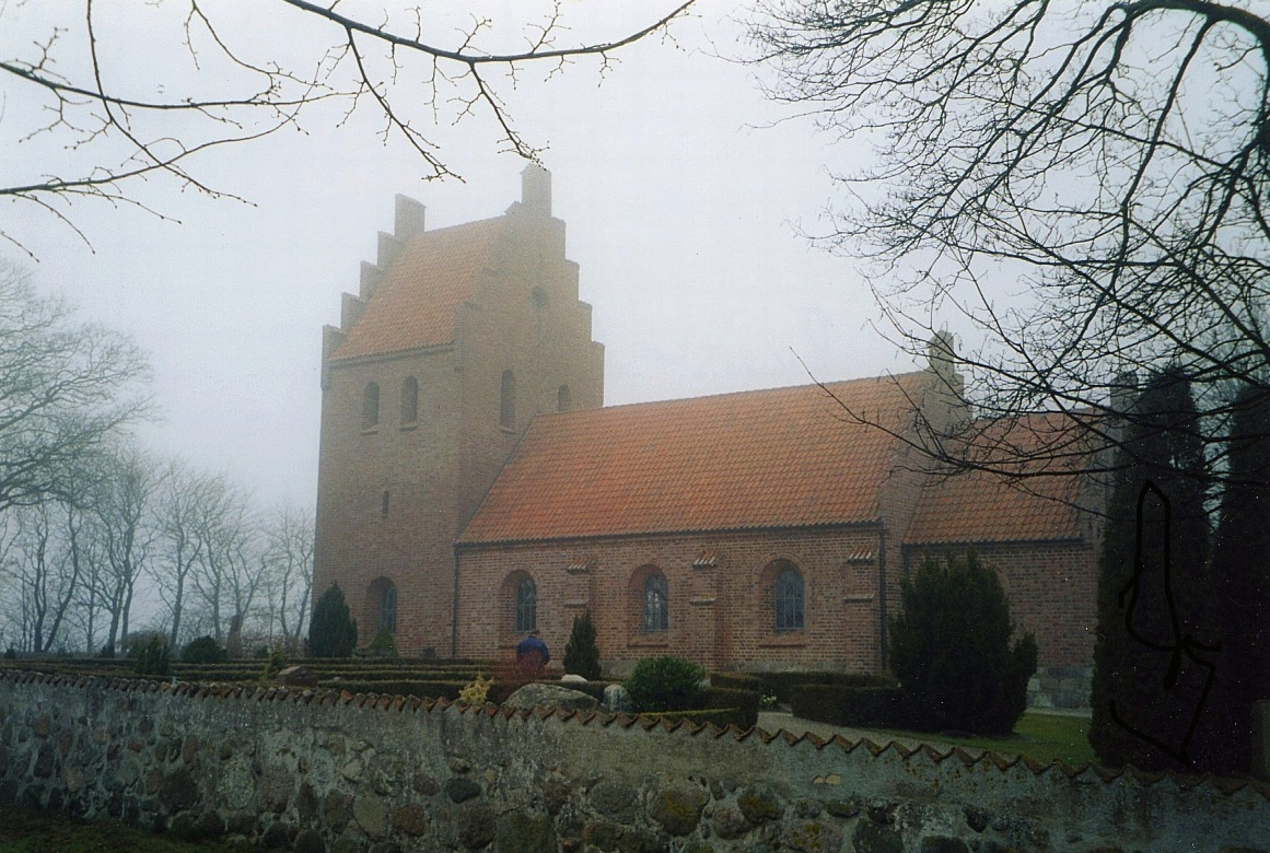 Reerslev Kirke, Høje-Taastrup Kommune